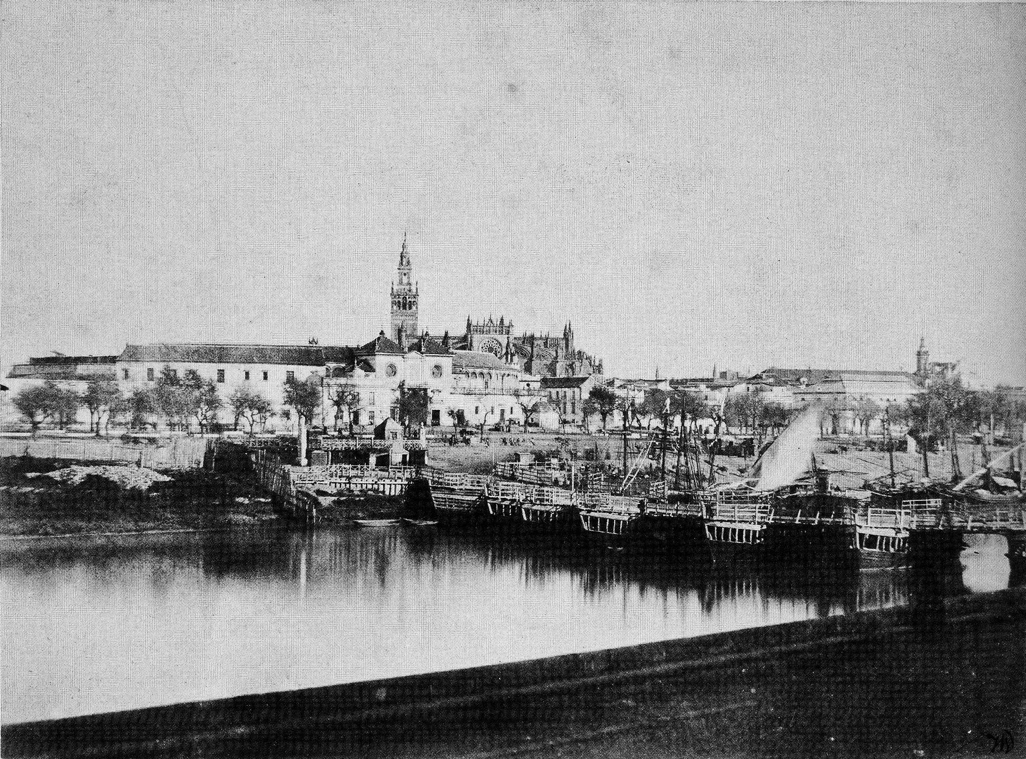 Vista del puente de barcas de Sevilla en 1851, en el emplazamiento provisional en el que se situó desde el inicio de las obras del Puente de Triana en 1851 en el emplazamiendo que había tenido antes el puente de la imagen, y el desmontaje del mismo en 1852, tras la finalización de las obras de su substituto